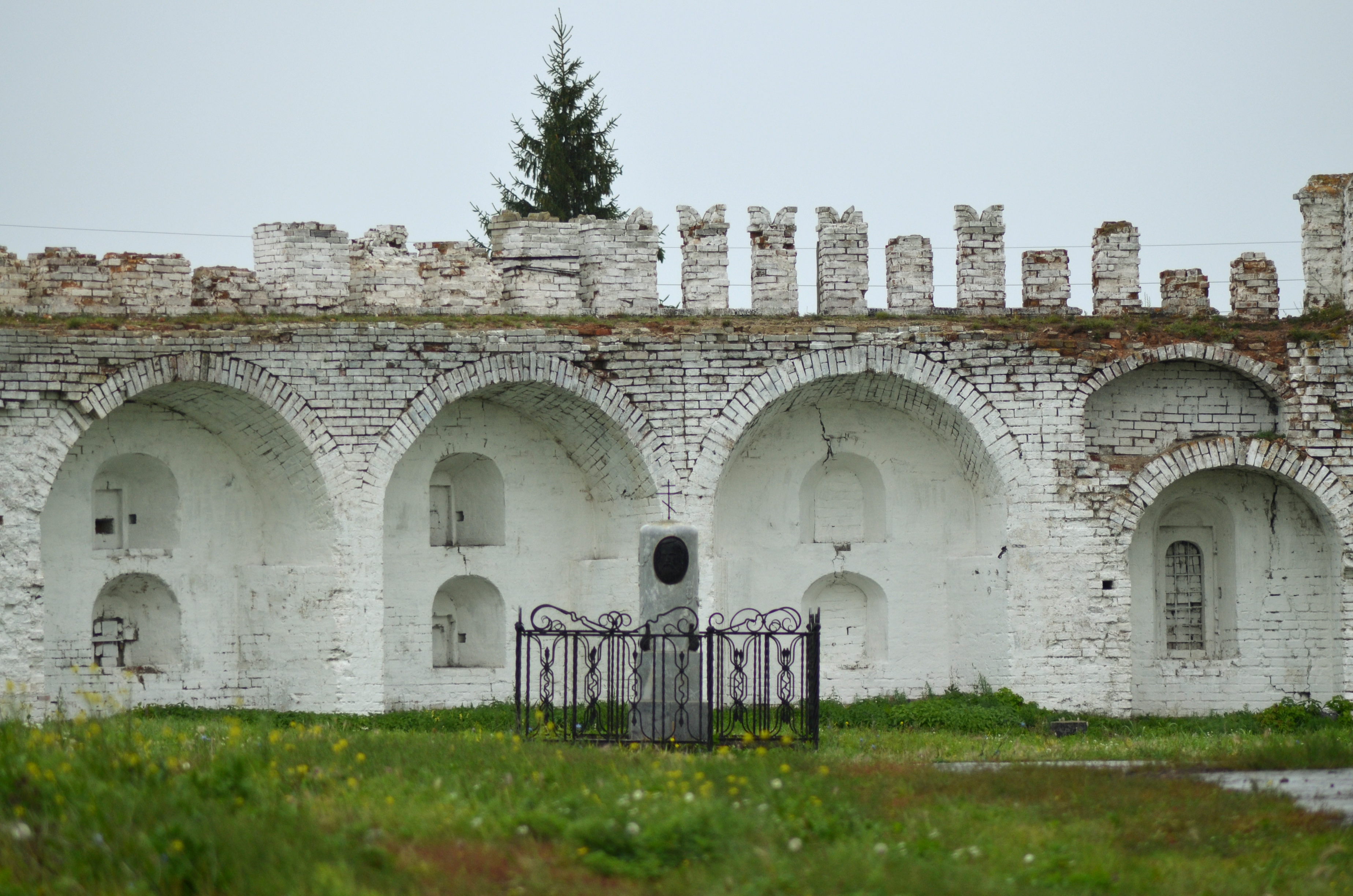 Красный бастион (башня западная) (руины) (Курганская область, Далматово, улица Советская, 63)